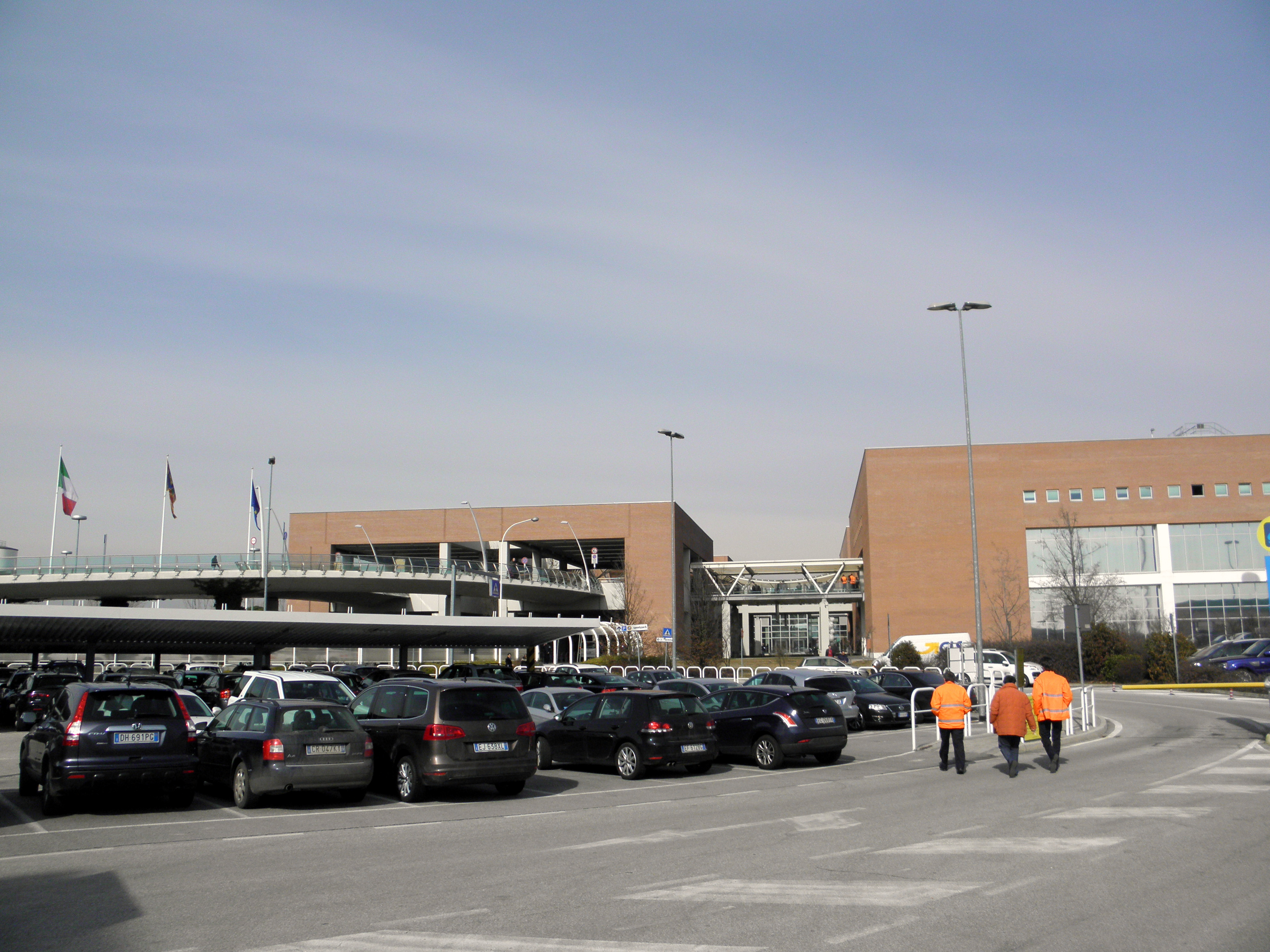 Aeroporto di Venezia-Tessera Marco Polo, vista del terminal passeggeri dal lato sud.